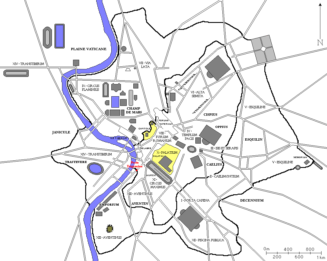 Plan de Rome avec la Porte Trigémine en rouge